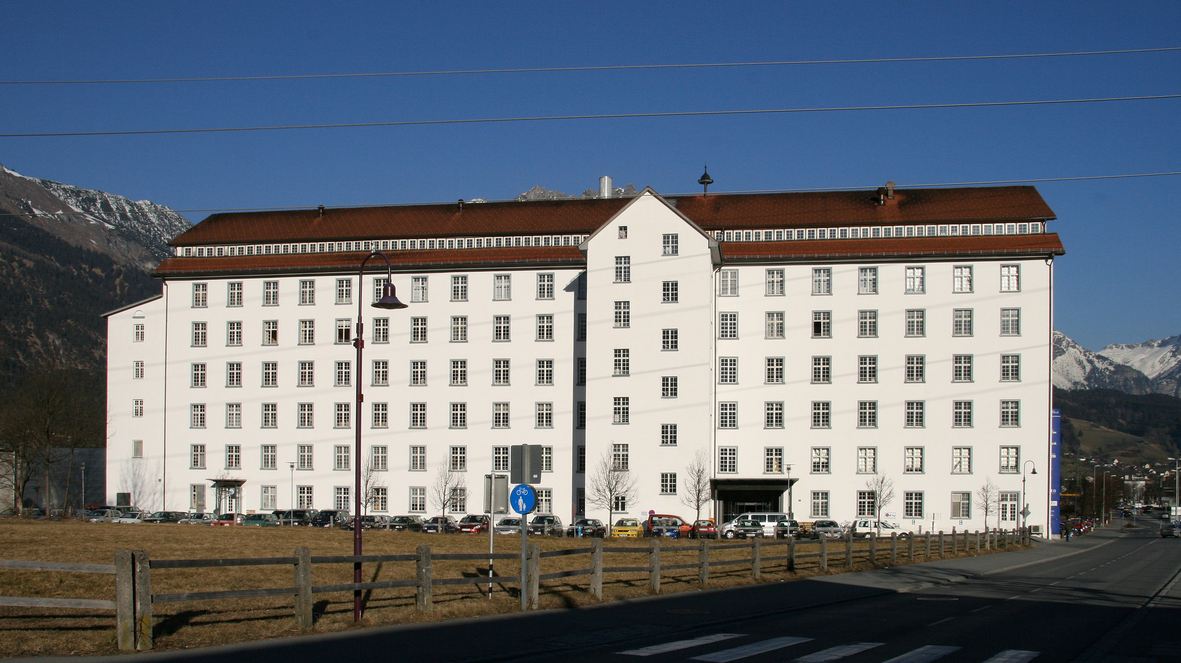 aus dem DEHIO Vorarlberg 1983: Spinnerei und Weberei Lünersee der Textilwerke Getzner, Mutter & Cie, in der Bürser Allee. 1836 erbaut. Erweiterungen 1850, 1856/57. 20achsig, 6geschossig mit ausgebautem Dachgeschoss unter Sattel- und Pultdach. Bemerkenswerter, früher Industriehochbau. *** in Bürs bei Bludenz. Heute EKZ Einkaufszentrum Lünerseepark. *** Veröffentlicht: Barbara Motter & Barbara Grabher-Schneider in "Orte-Fabriken-Geschichten ISBN 978-37099-7097-3 2014